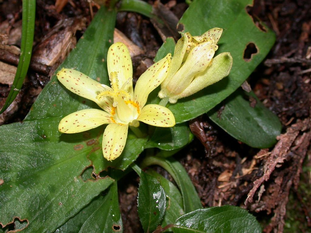 Tricyrtis nana：チャボホトトギス 2004/09/04 和歌山県田辺市：Tanabe City. Wakayama Pref. Japan